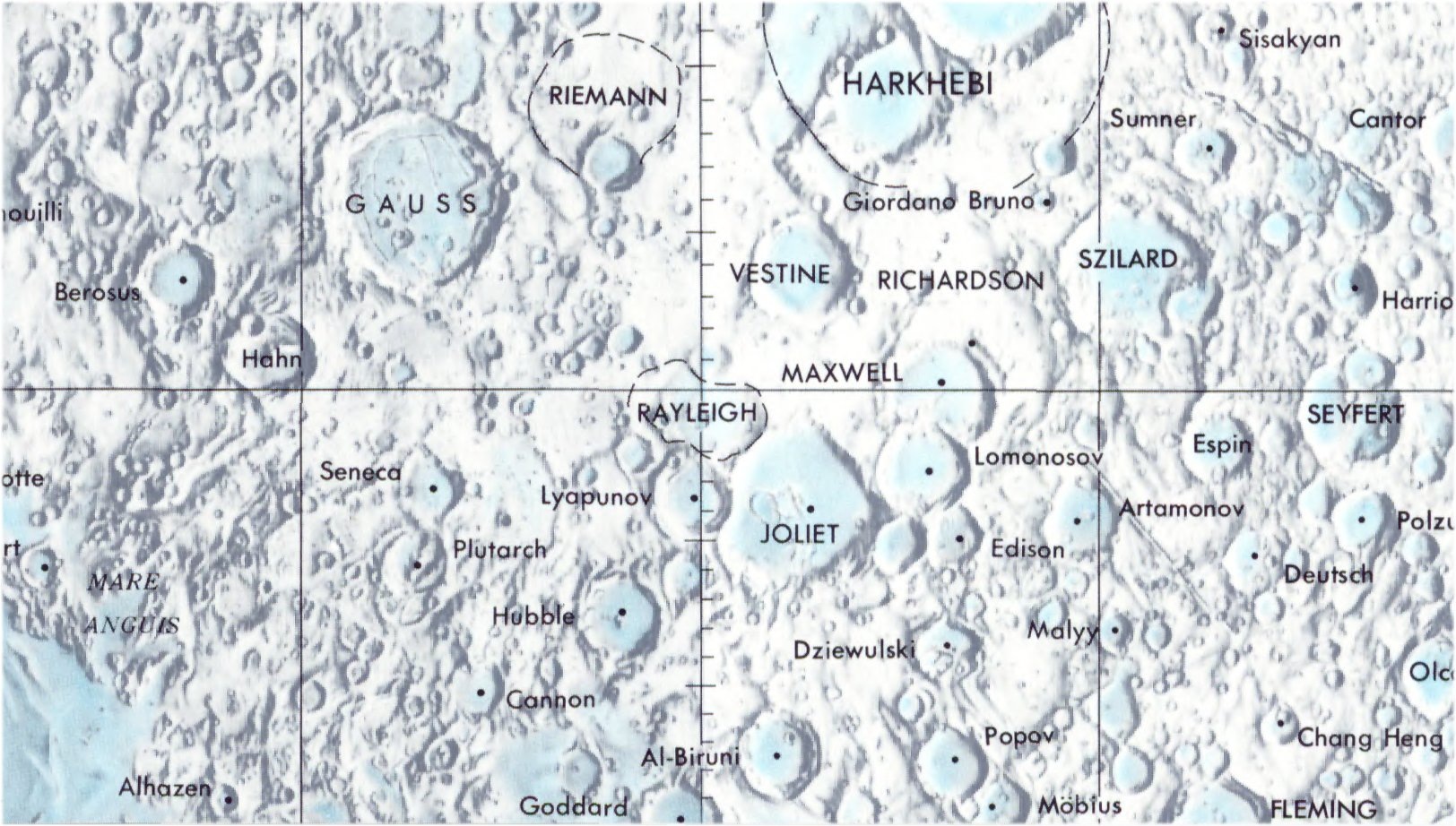 Cráter lunar Rayleigh. Localización. (Lunar Chart LPC1. Second Edition)